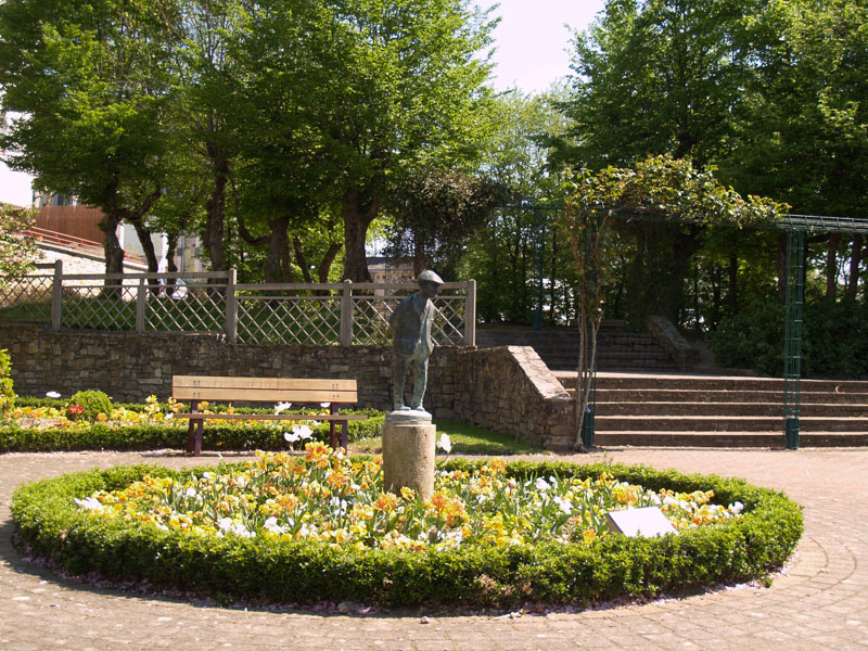 Le Square de l'Homme content abrite, comme son nom l'indique, la statuette de l'Homme Content. Elle représente l'habitant typique des Campines, dans la région de Eersel, aux Pays-Bas. Cette œuvre, mise en place dans le cadre du jumelage entre Carquefou et Eersel, est quasiment identique à celle du "Contente Mens" ornant la place du Marché d'Eersel.